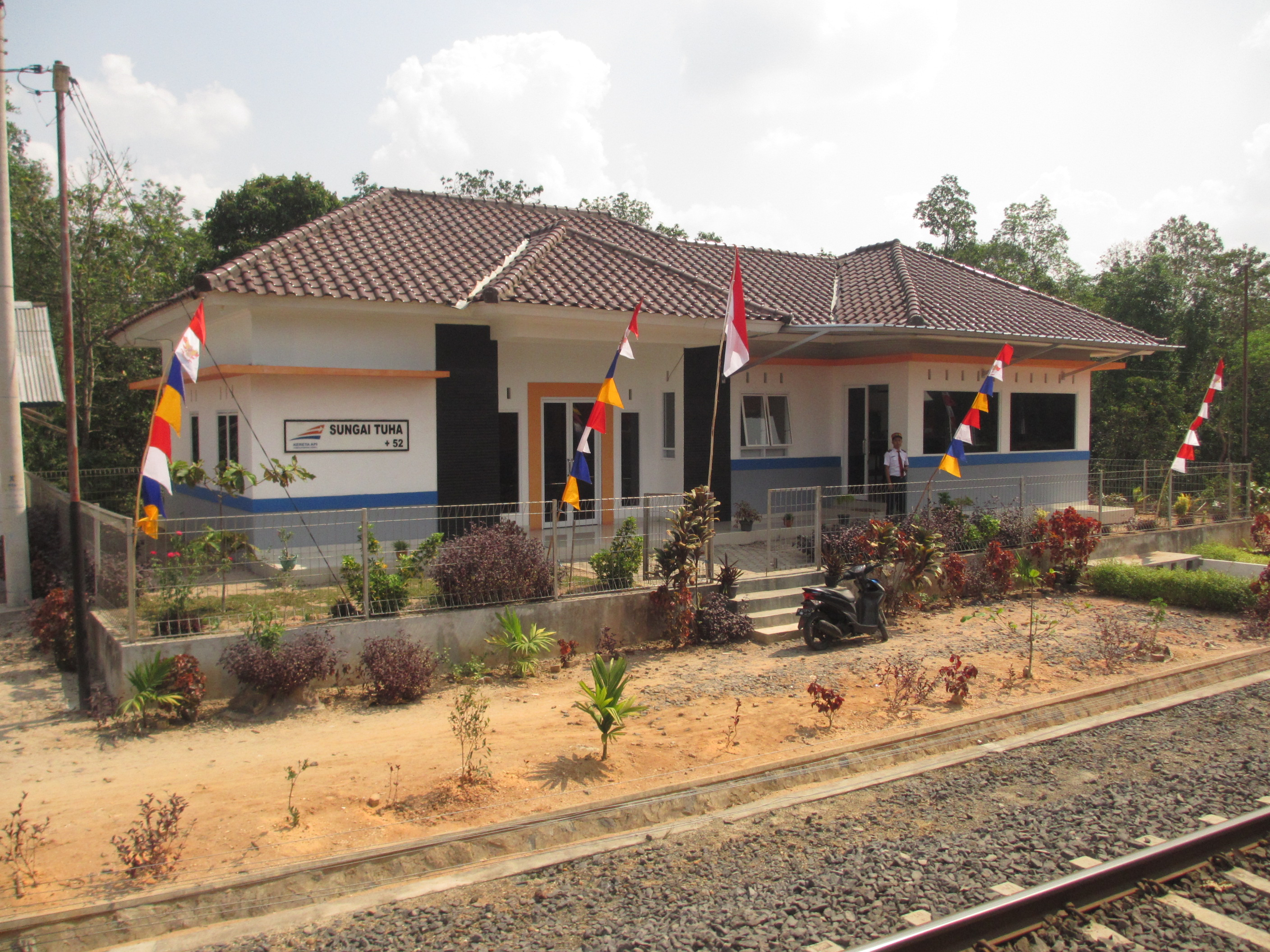 Stasiun Sungai Tuha.